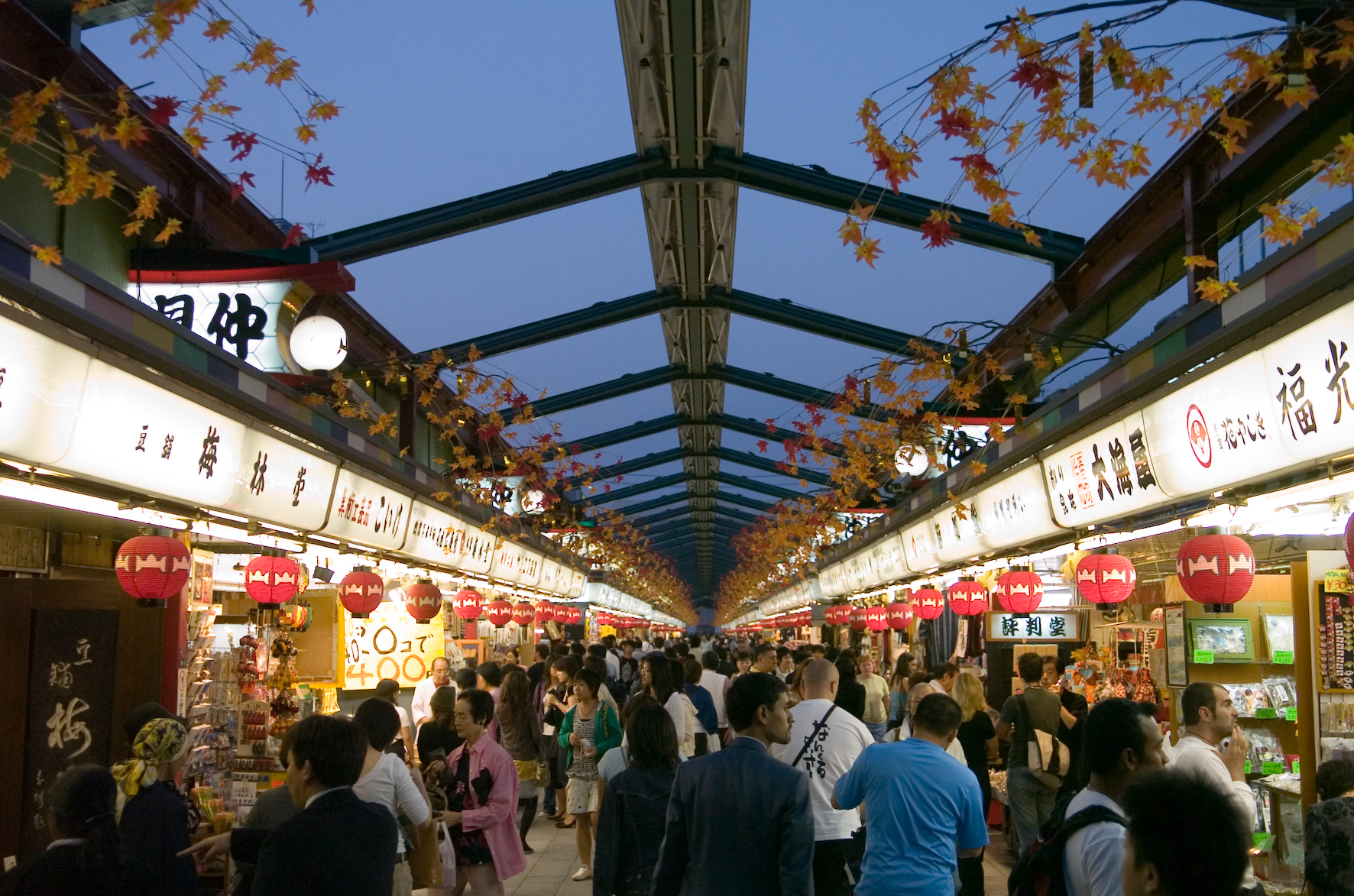 Asakusa